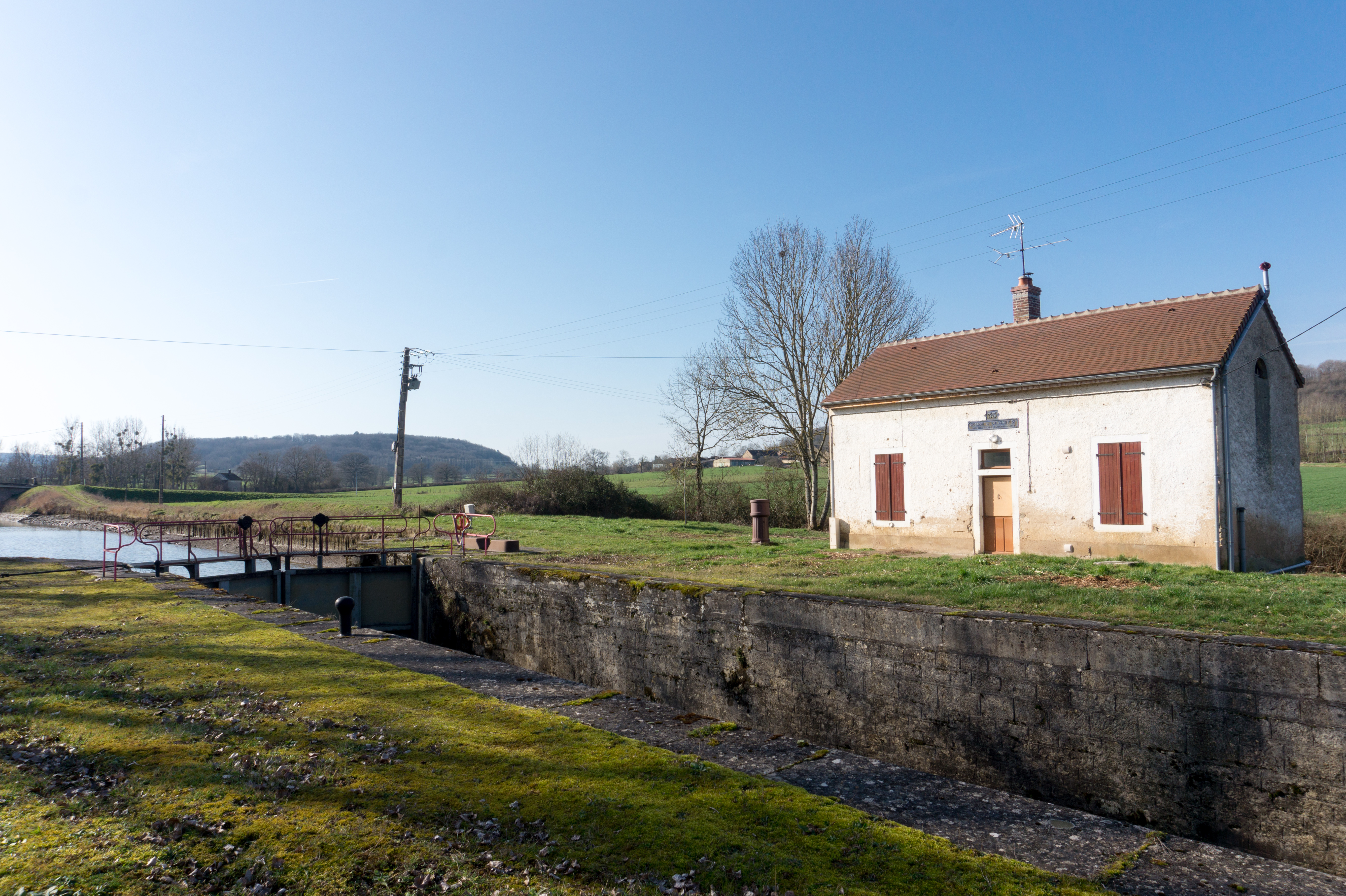 Écluse de Chassey, le long du canal de Bourgogne